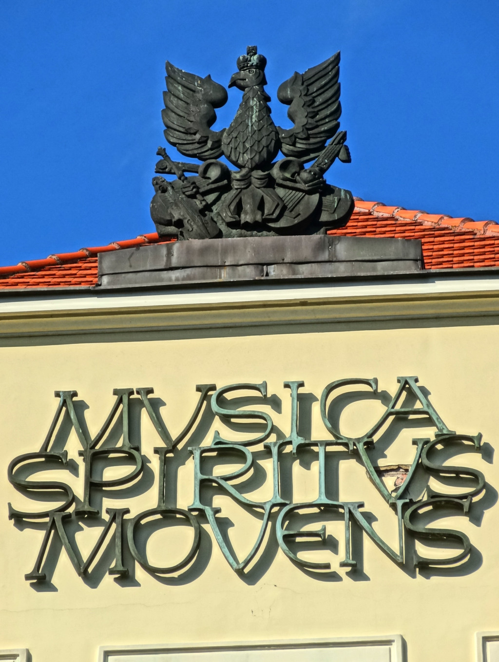 Zespół Urzędu Powiatowego, zbud. 1904-1906, ob. budynek główny Akademii Muzycznej w Bydgoszczy przy ul. Słowackiego